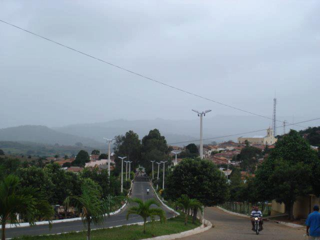 Vista da avenida Maria Gonçalves Dantas, em Porteiras, Ceará na altura do arco de Nossa Senhora da Conceição